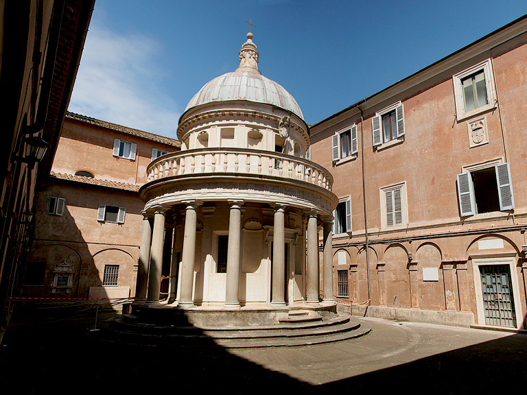 Tempietto del Bramante a San Pietro in Montorio, Roma.